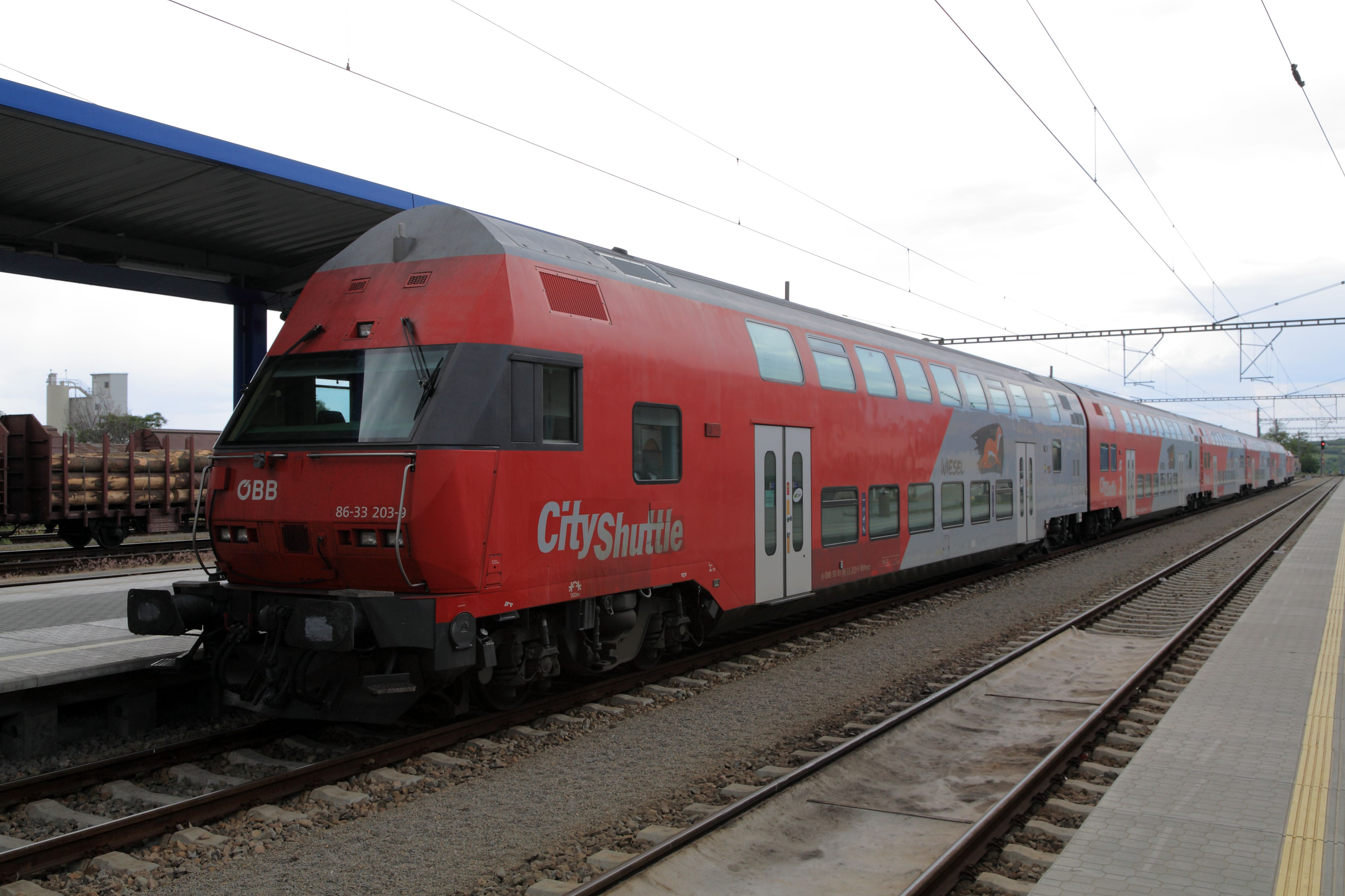 ÖBB-Nahverkehrsdoppelstocksteuerwagen, Gattung Bbfmpz, eingesetzt als Regionalexpress Wien–Znojmo und zurück beim Wendehalt im Bf Znojmo. Die Wagen sind nur für eine Zugsammelschienenspannung von 1000 Volt ausgelegt, sie sind wie viele neuere Reisezugwagen jedoch auch mit einer Frequenz von 50 Hertz zu versorgen. Der Abschnitt von der Grenze bis Znojmo wird allerdings mit 15 kV gespeist, solange es keine elektrifizierte Verbindung mit dem tschechischen Netz gibt.